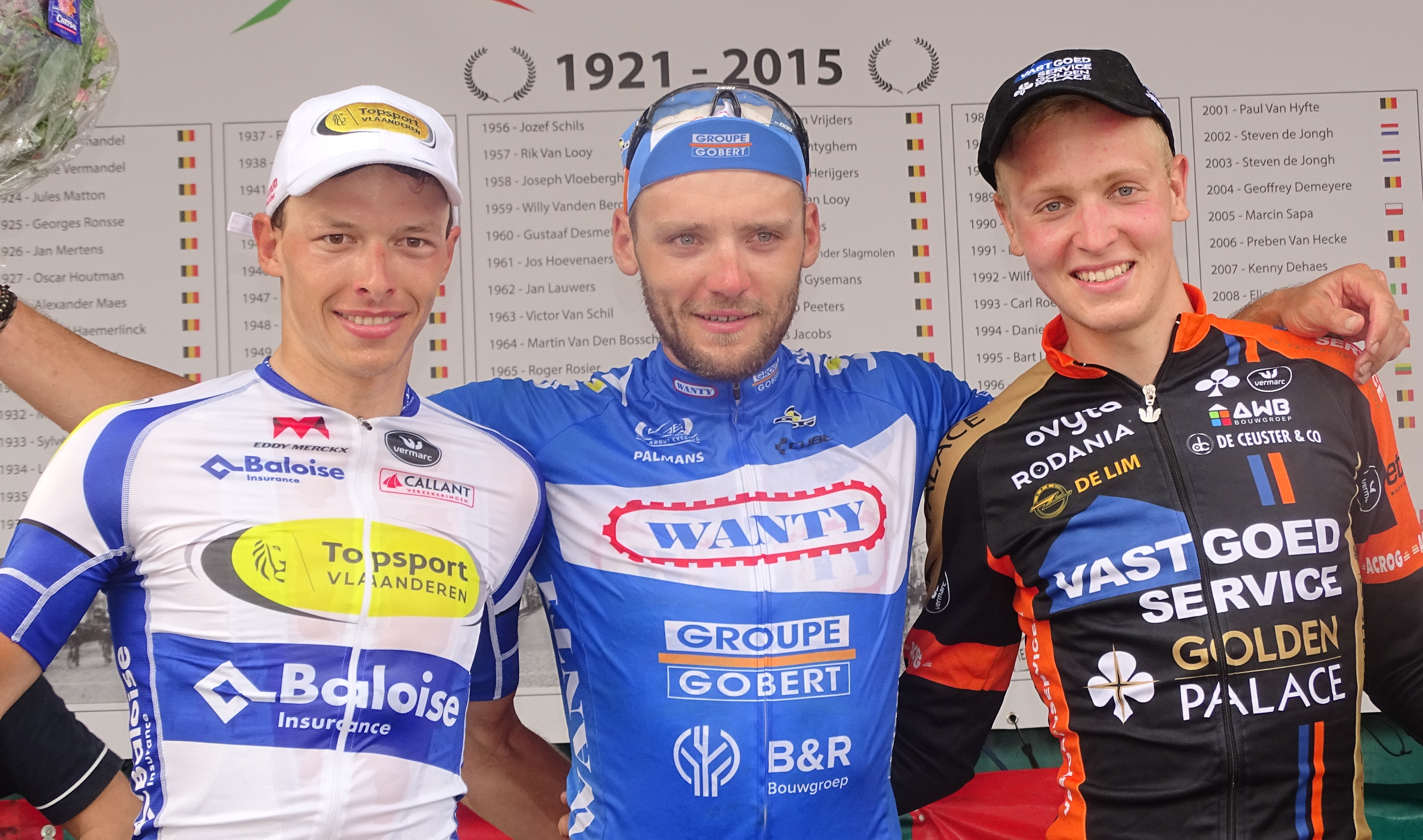 Reportage réalisé le dimanche 30 août à l'occasion du départ et de l'arrivée de la Coupe Sels 2015 à Merksem (Anvers), Belgique.